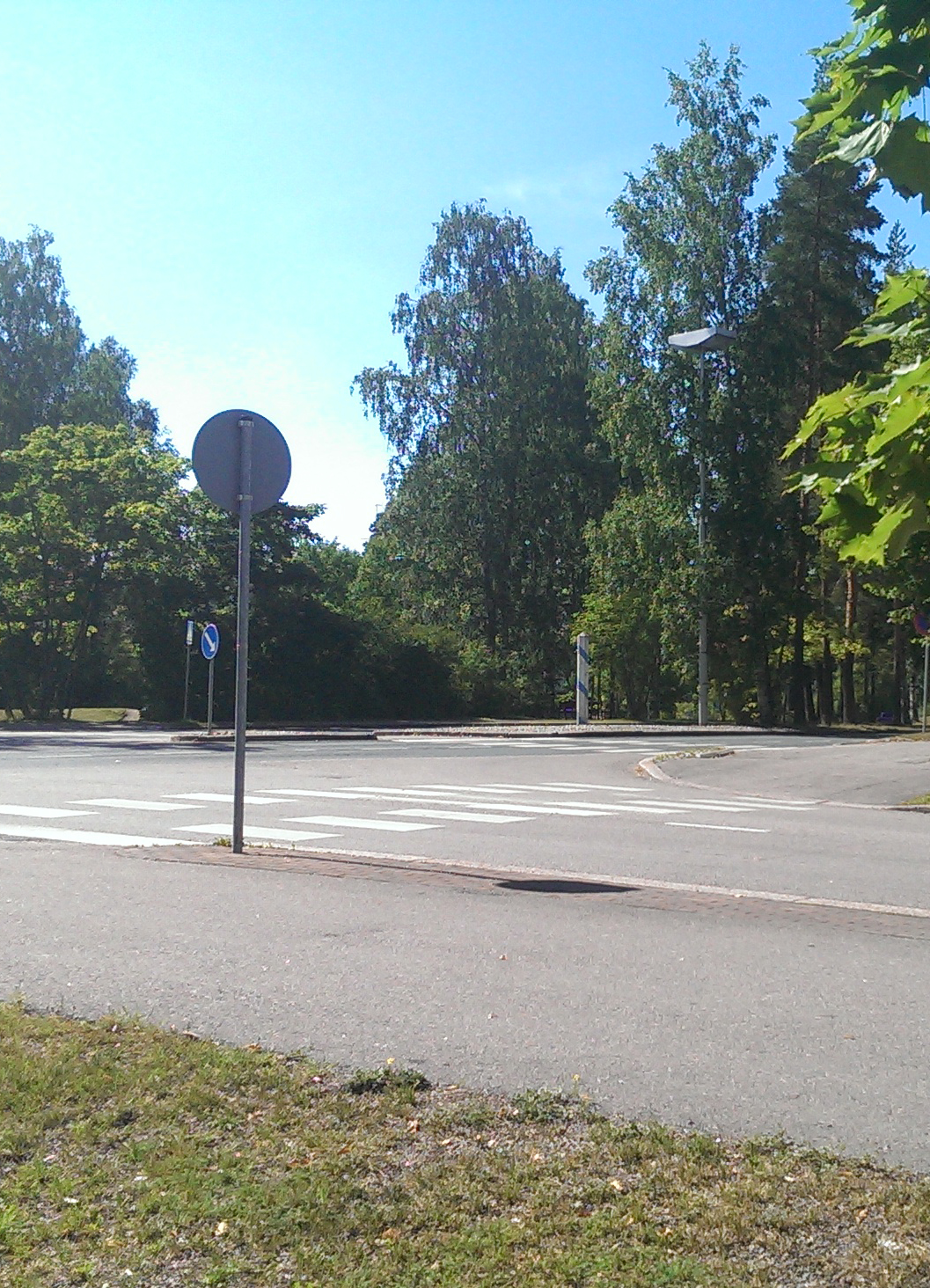 Kirjavantolpan risteys Hyvinkäällä